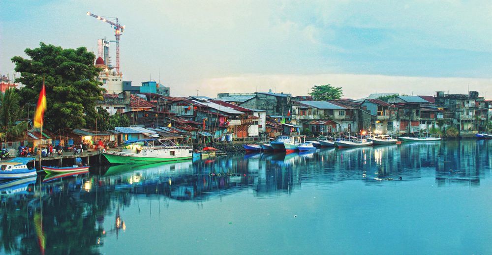 riverside